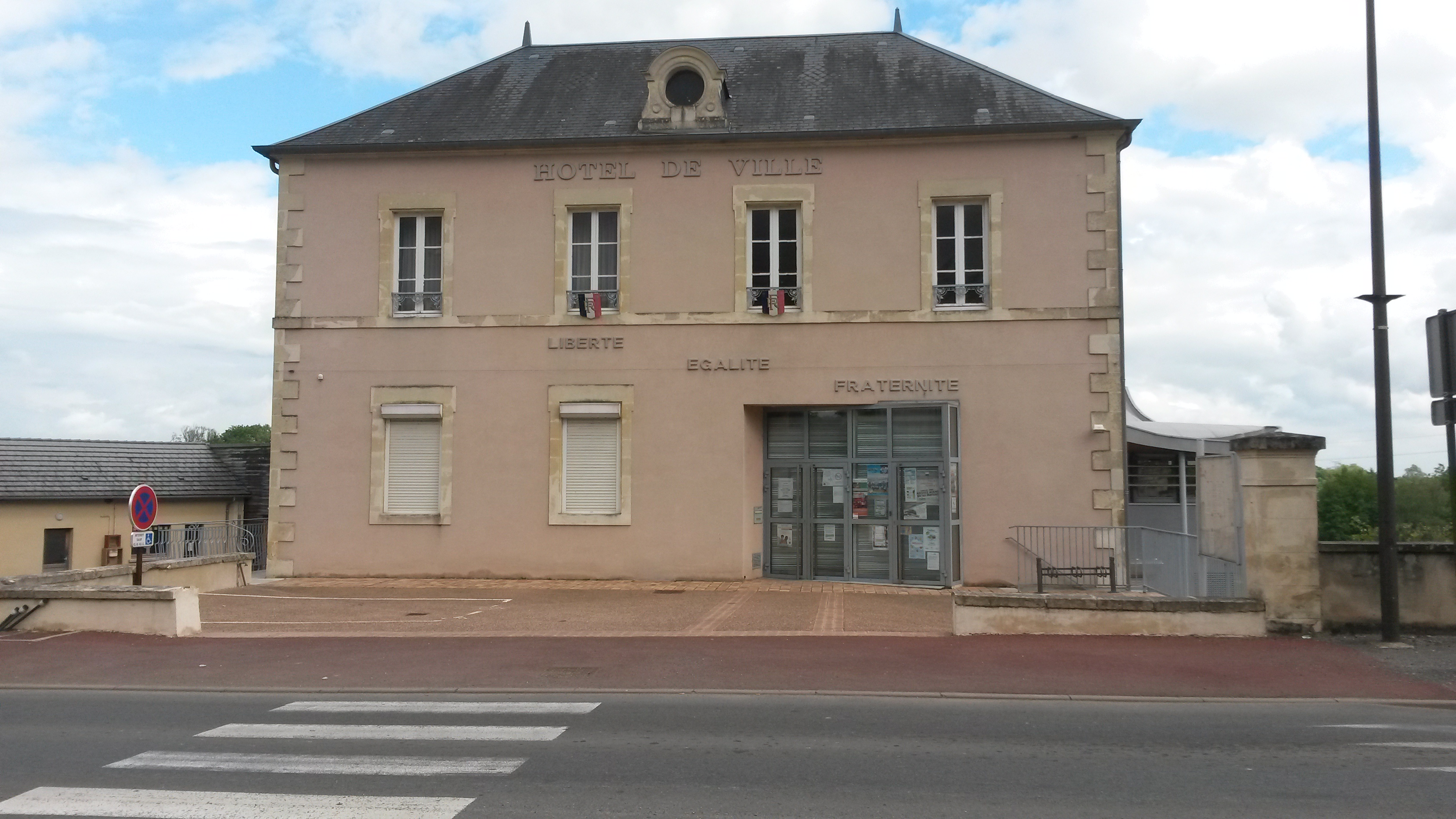 Coulanges-les-Nevers (mairie)